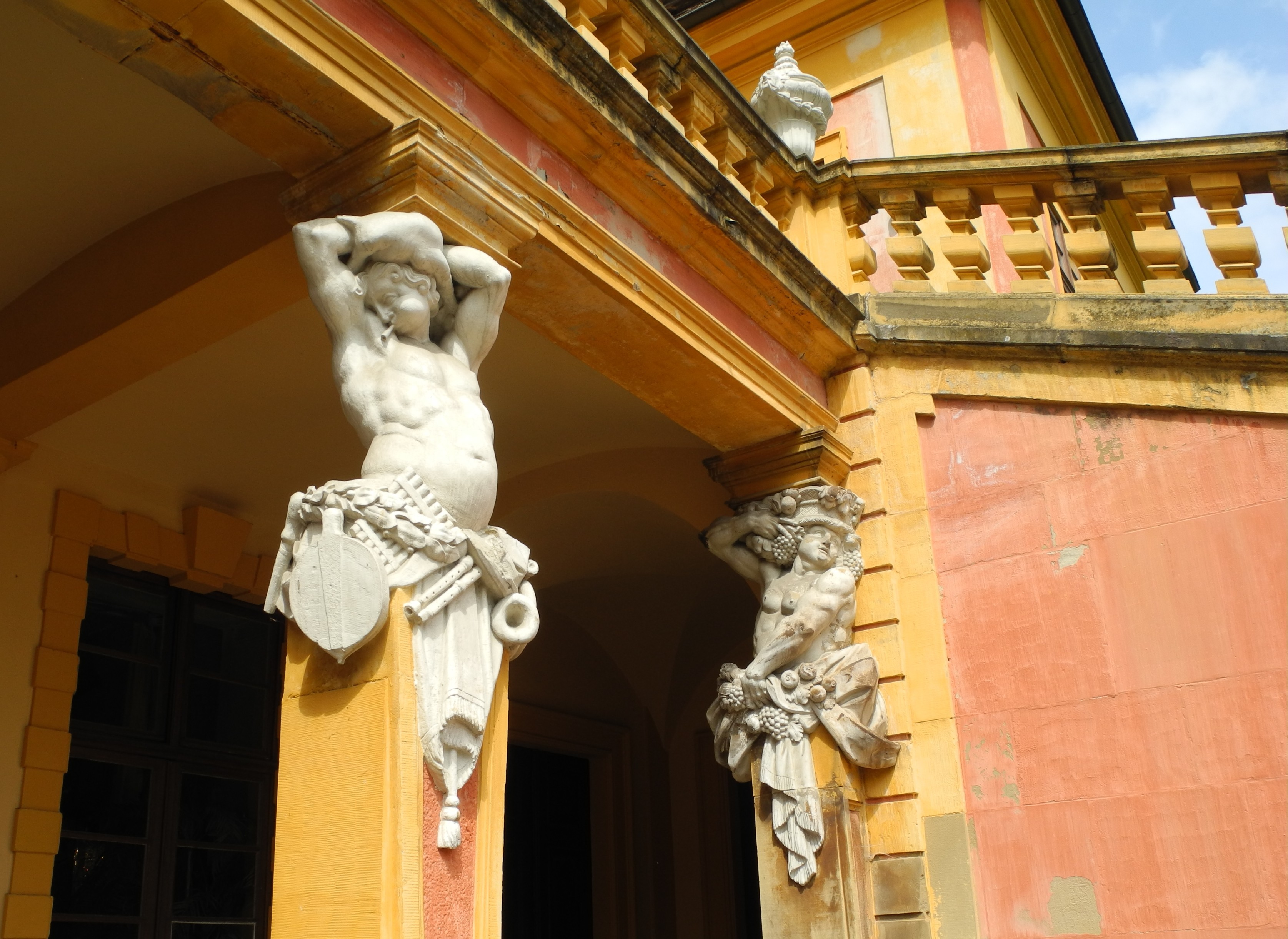 Ludwigsburg - Jagd- und Lustschloss Favorite.JPG